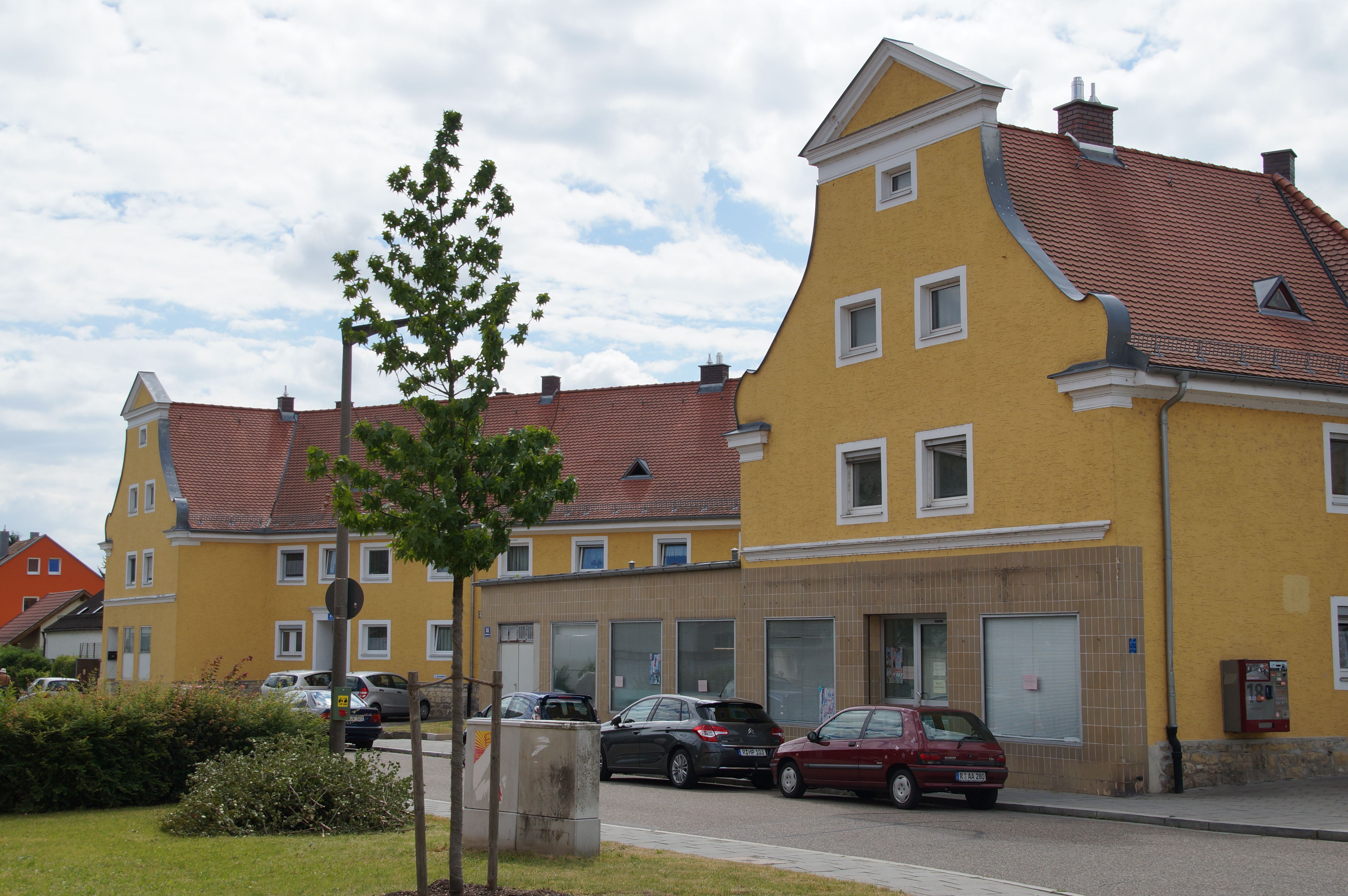 Ensemble Wohnsiedlung Arberstraße, Reinhausen, Regensburg, Arbeitersiedlung aus der Zeit nach dem Ersten Weltkrieg, Ladengeschäft in der Alten Waldmünchener Straße